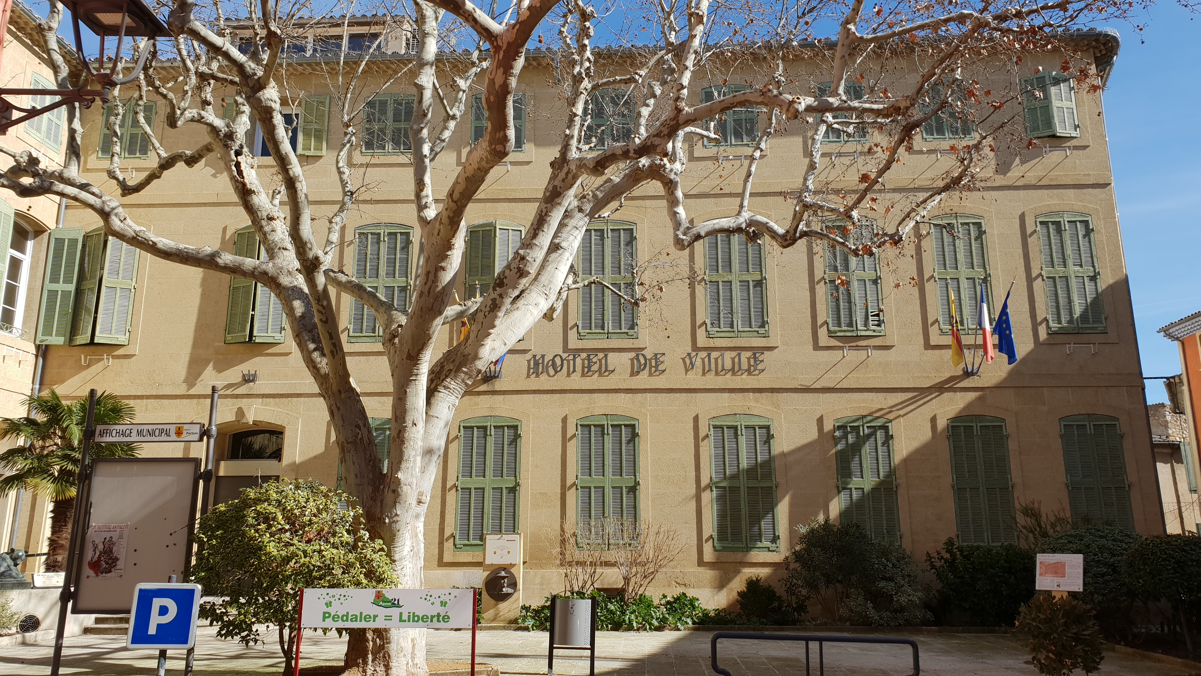 L'hôtel de ville de Pertuis (Vaucluse, France)